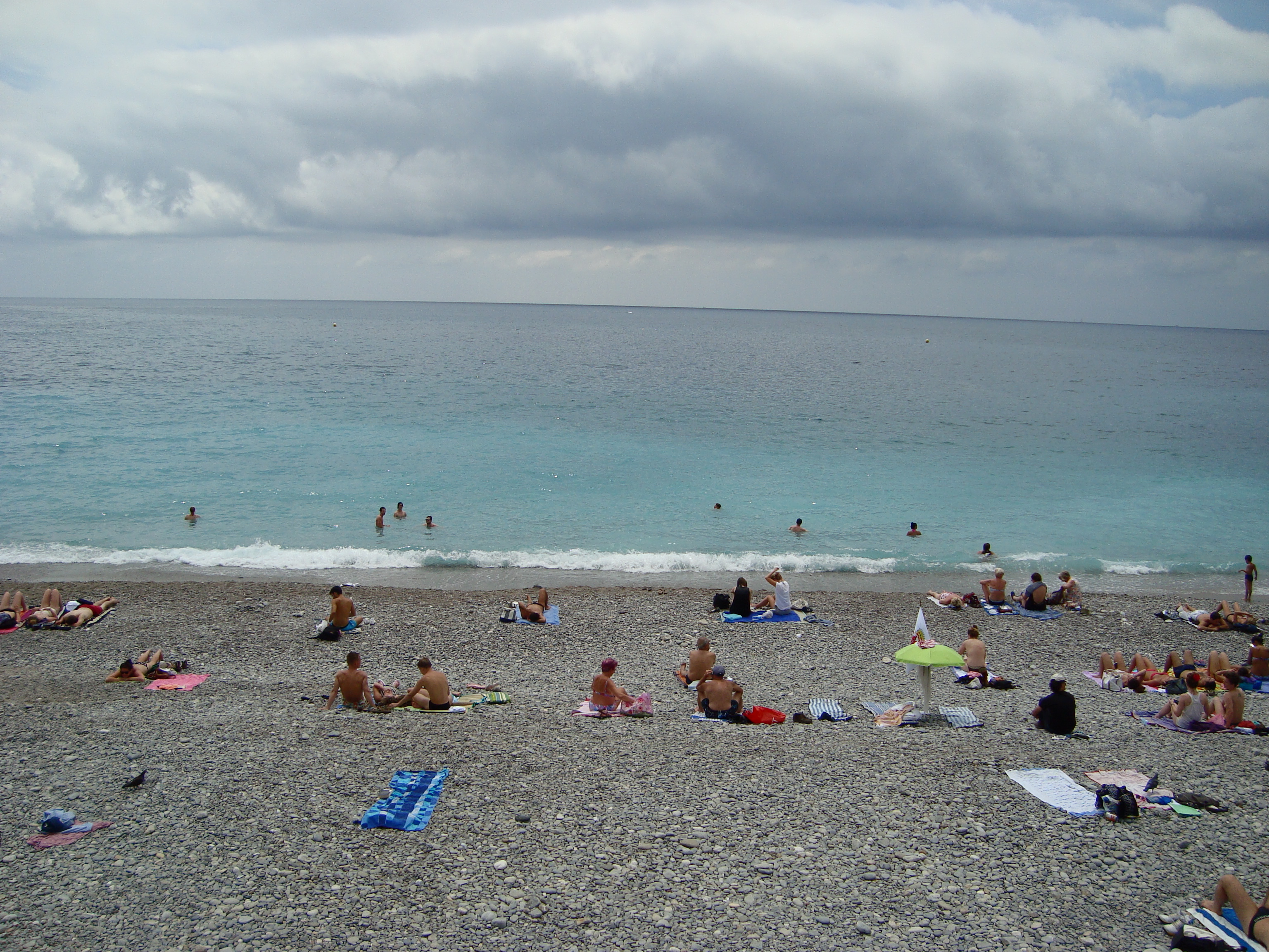 Nice Ville